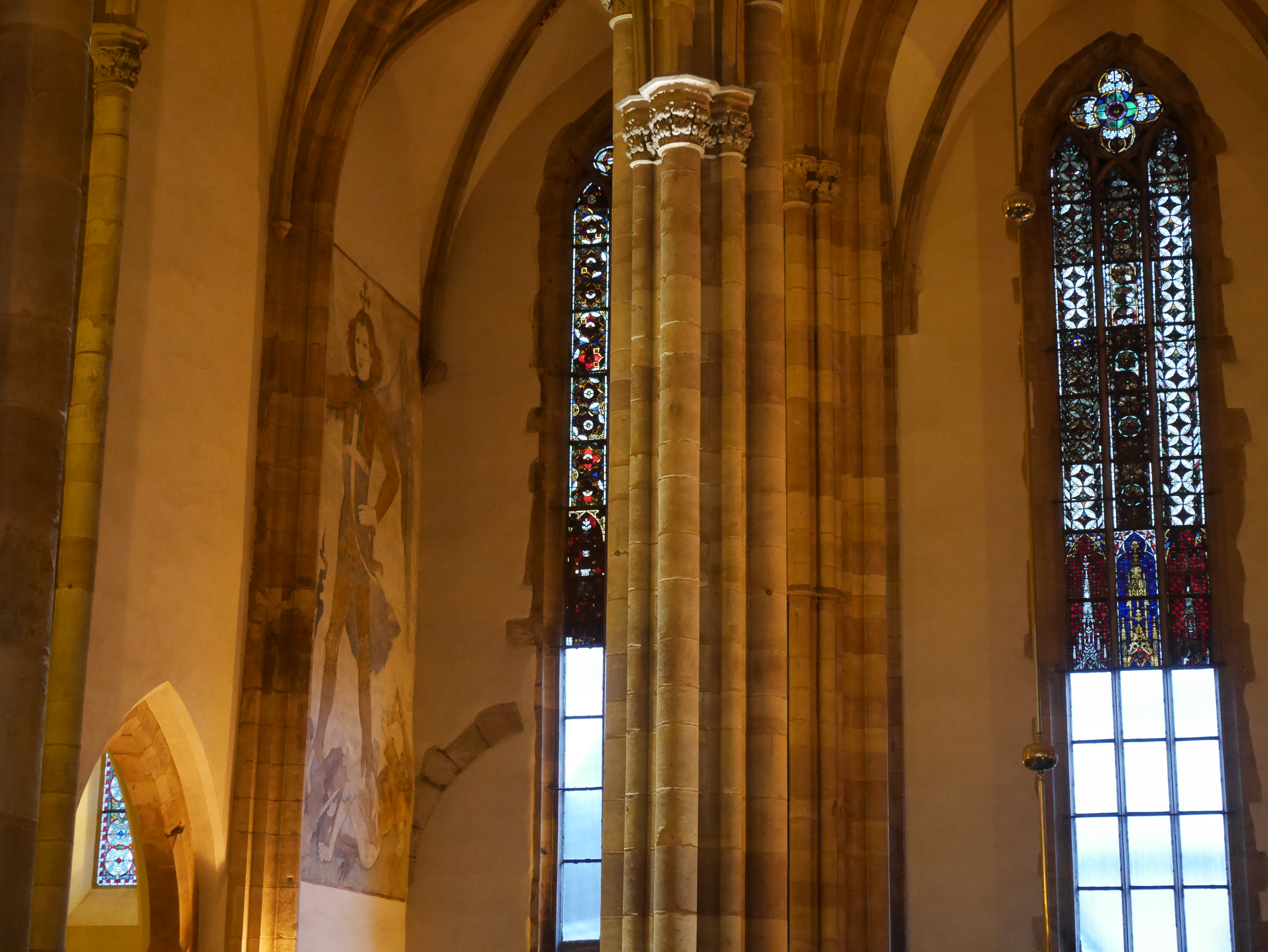 Interior of Église Saint-Thomas, Strasbourg Wandbild